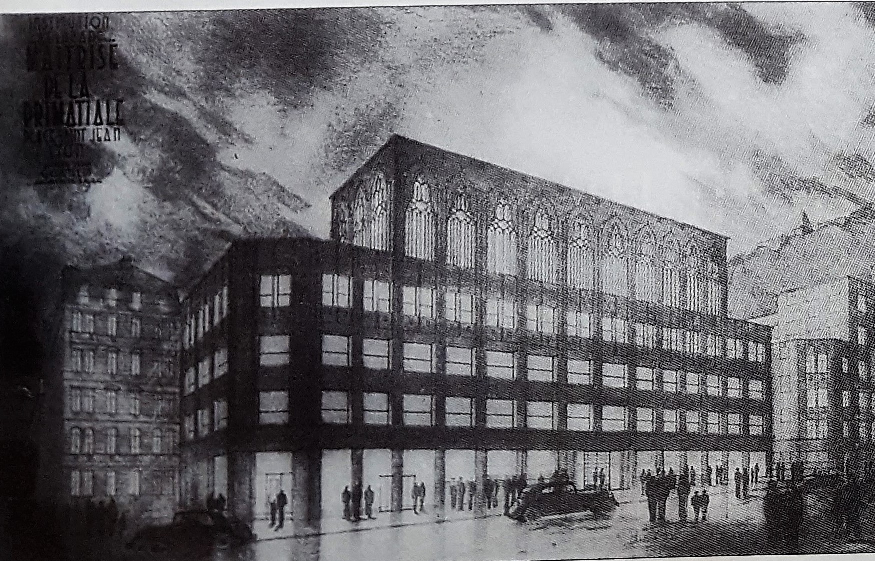 Illustration du premier projet pour le petit séminaire Saint Jean datant de 1936